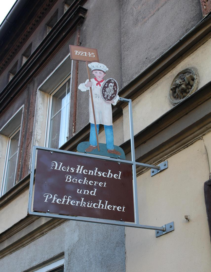 Szyld dawnej piernikarni Aloisa Hentschla w Bardzie produkującej Bardzkie Pierniki odtworzony w 2014 r. przez grupę pasjonatów.